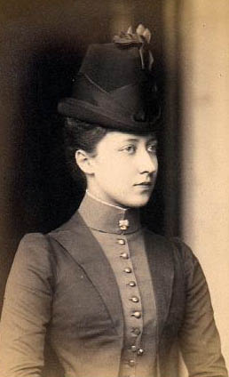 Luisa, Princesa Real